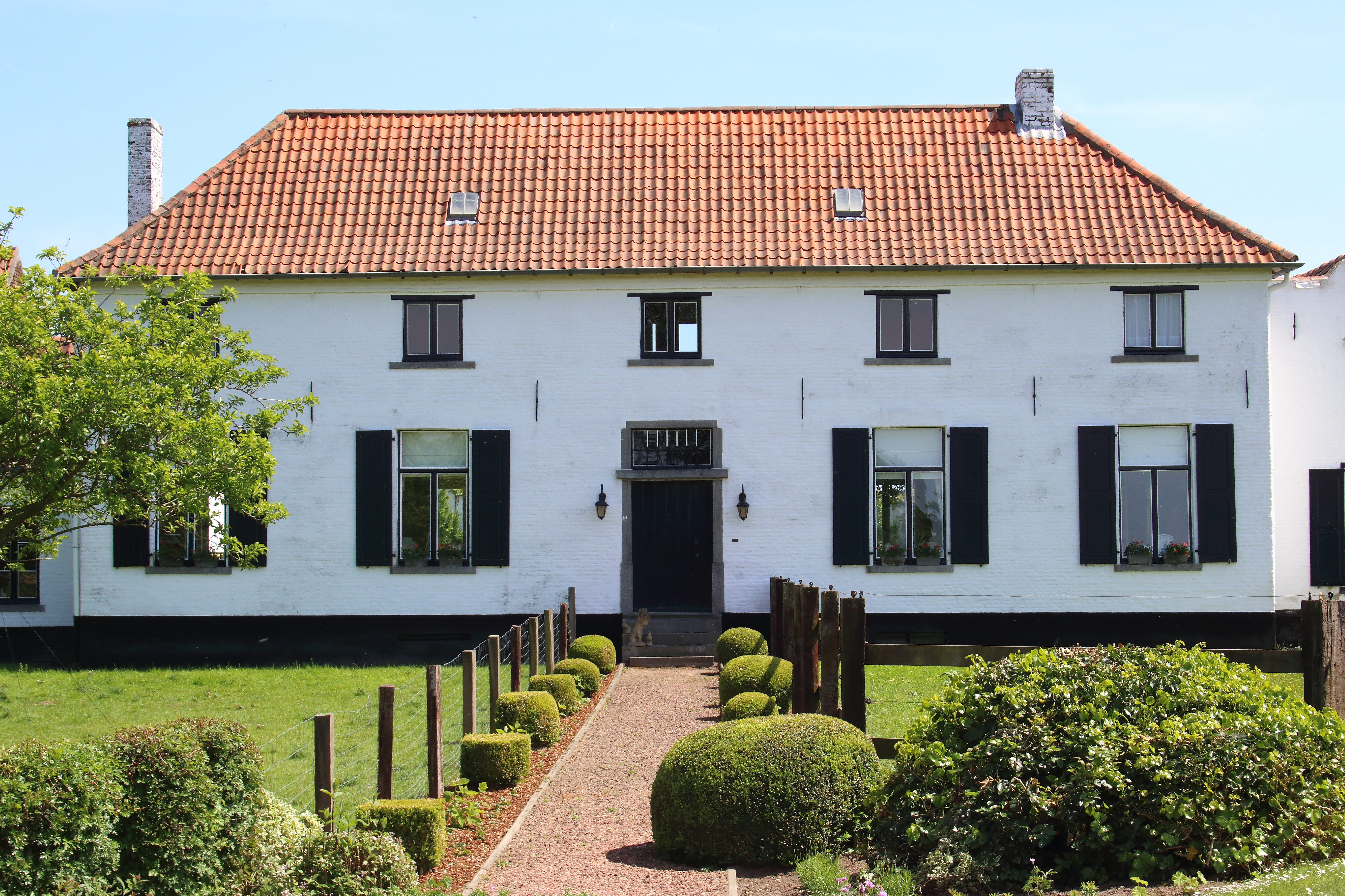 Munkboshoeven, Velzeke-Ruddershove, Zottegem, Vlaanderen, België